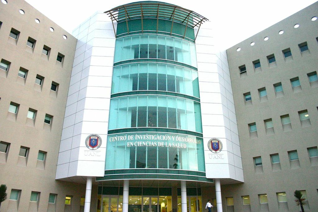 Centro de Investigación y Desarrollo en Ciencias de la Salud. El estado de Nuevo León